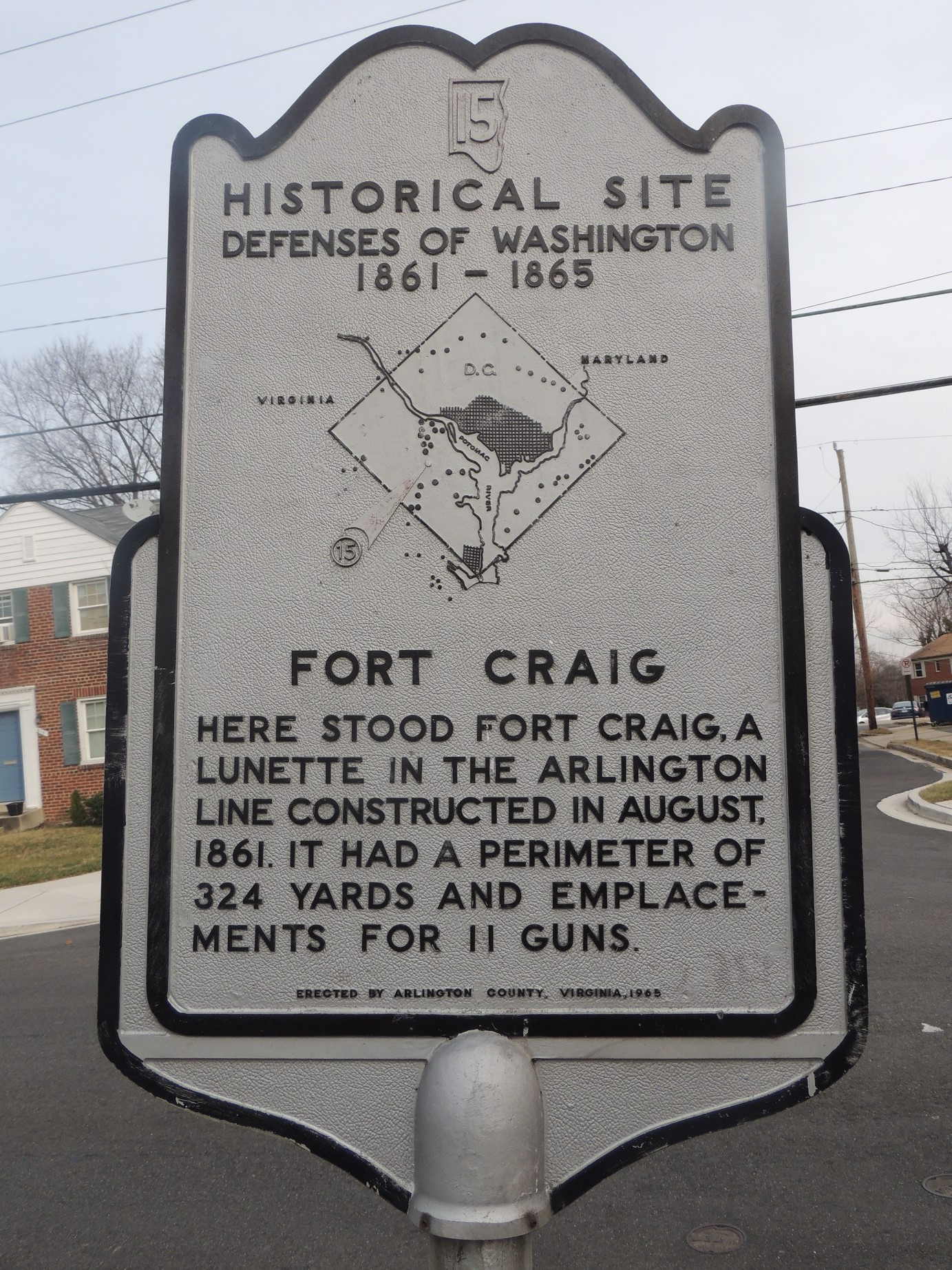 Historical marker at the site of Fort Craig in Arlington, VA (2016)